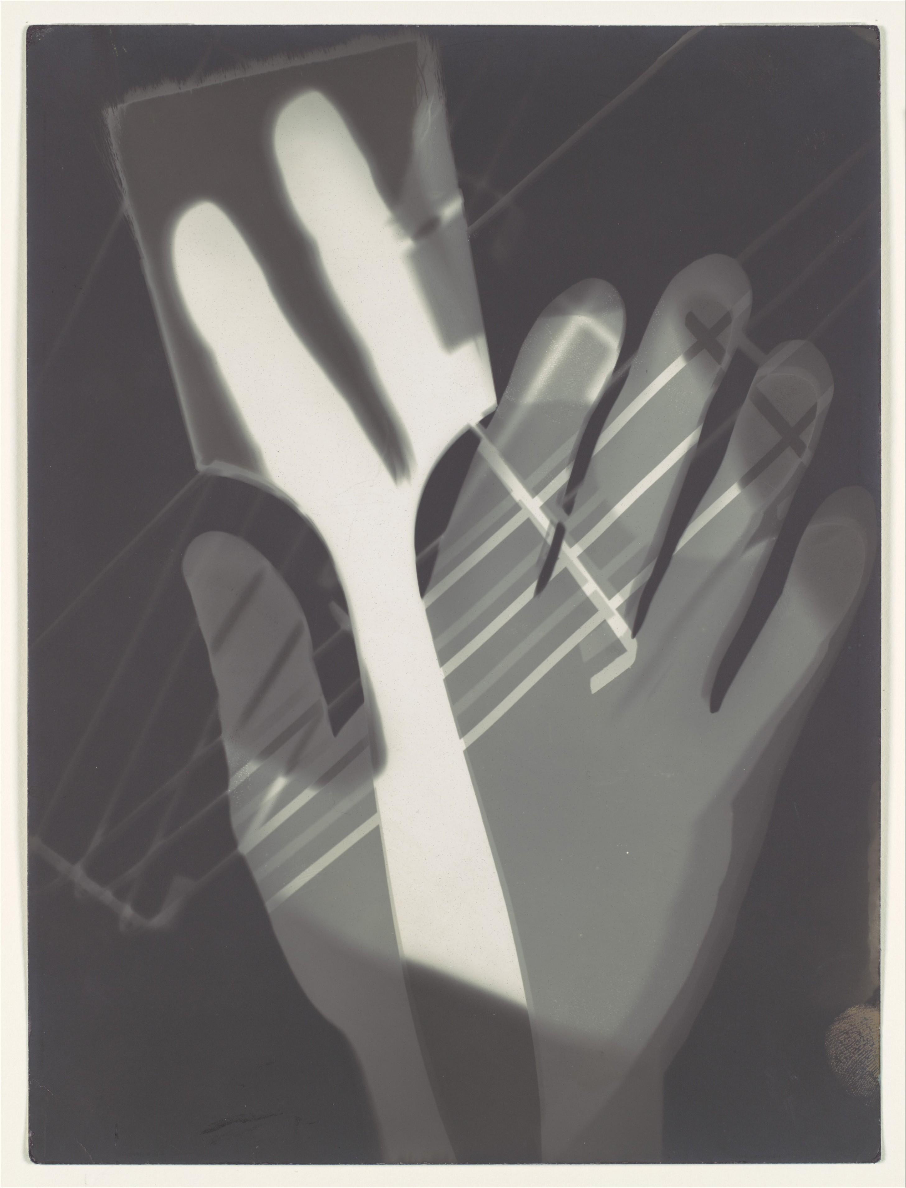 Photogram; Photographs